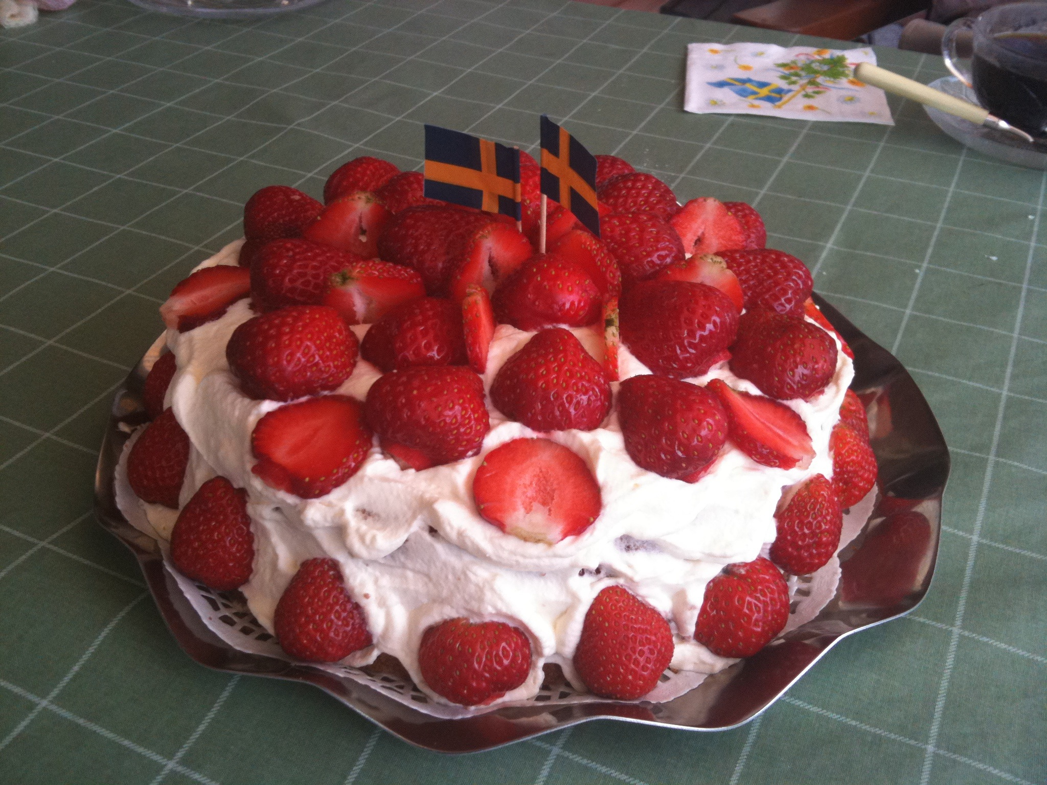 Min födelsedagstårta